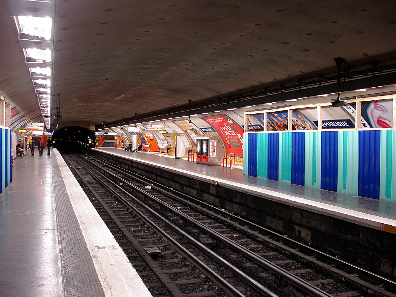 Station République de la ligne 5 du métro de Paris, France.